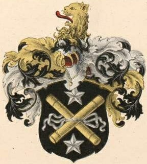 Oettingeni suguvõsa aadlivapp